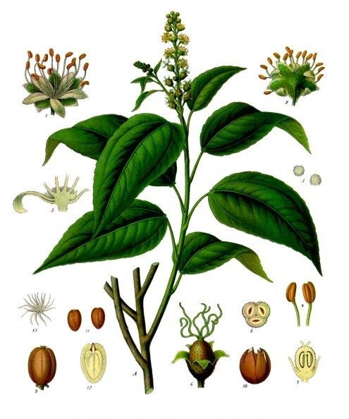 Krotonölbaum. A blühender Zweig in natürl. Grösse; 1 u. 2 männliche Blüthe von vorn und hinten, vergrössert; 3 Längsschnitt durch den Blüthenboden der männlichen Blüthe, desgl.; 4 Staubgefässe, desgl.; 5 Pollen, desgl.; 6 weibliche Blüthe, desgl.; 7 u. 8 Fruchtknoten im Längs- und Querschnitt, desgl.; 9 Fruchtkapsel, natürl. Grösse; 10 aufspringende Kapsel, desgl.; 11 Same, desgl.; 12 derselbe im Längsschnitt, vergrössert; 13 Sternhaare, desgl.